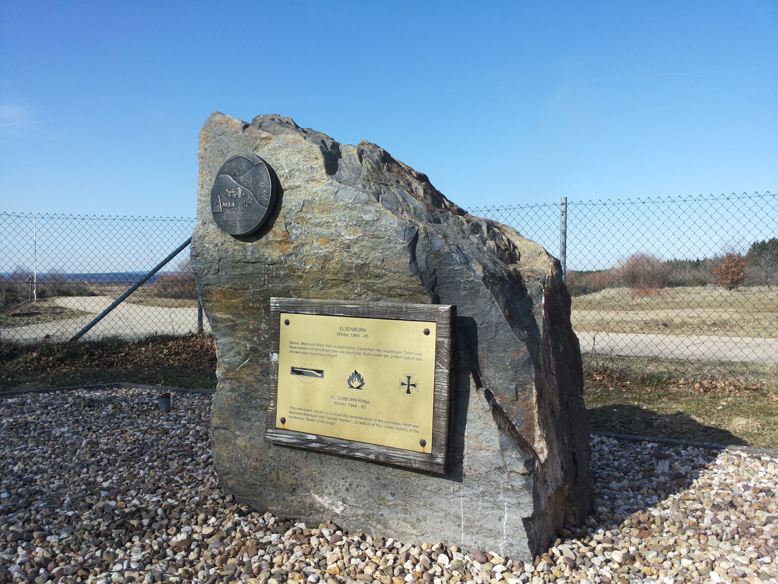 Mahnmal zum Gedenken der Toten der Ardennenoffensive